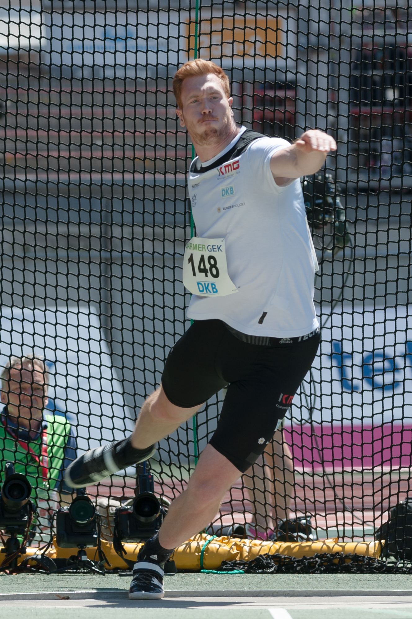 Deutsche Leichtathletik-Meisterschaften 2015: Männer Diskuswurf - Christoph Harting, SCC Berlin